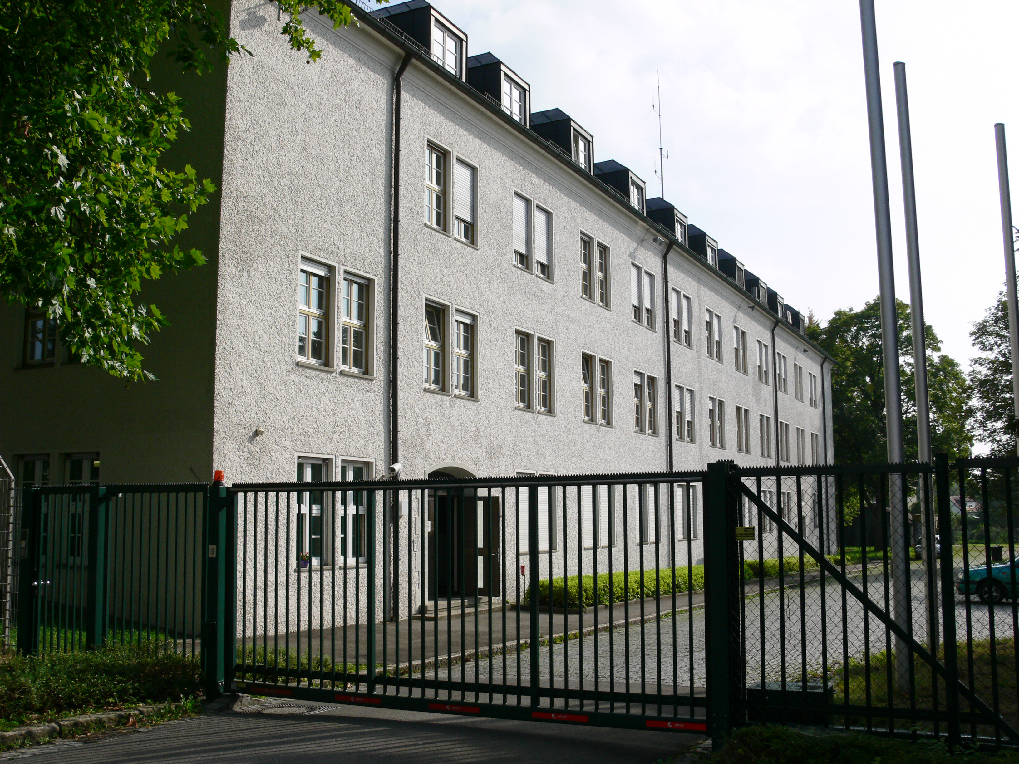 Ravensburg, ehemaliges Kraftwerk, heute Polizeidienststelle